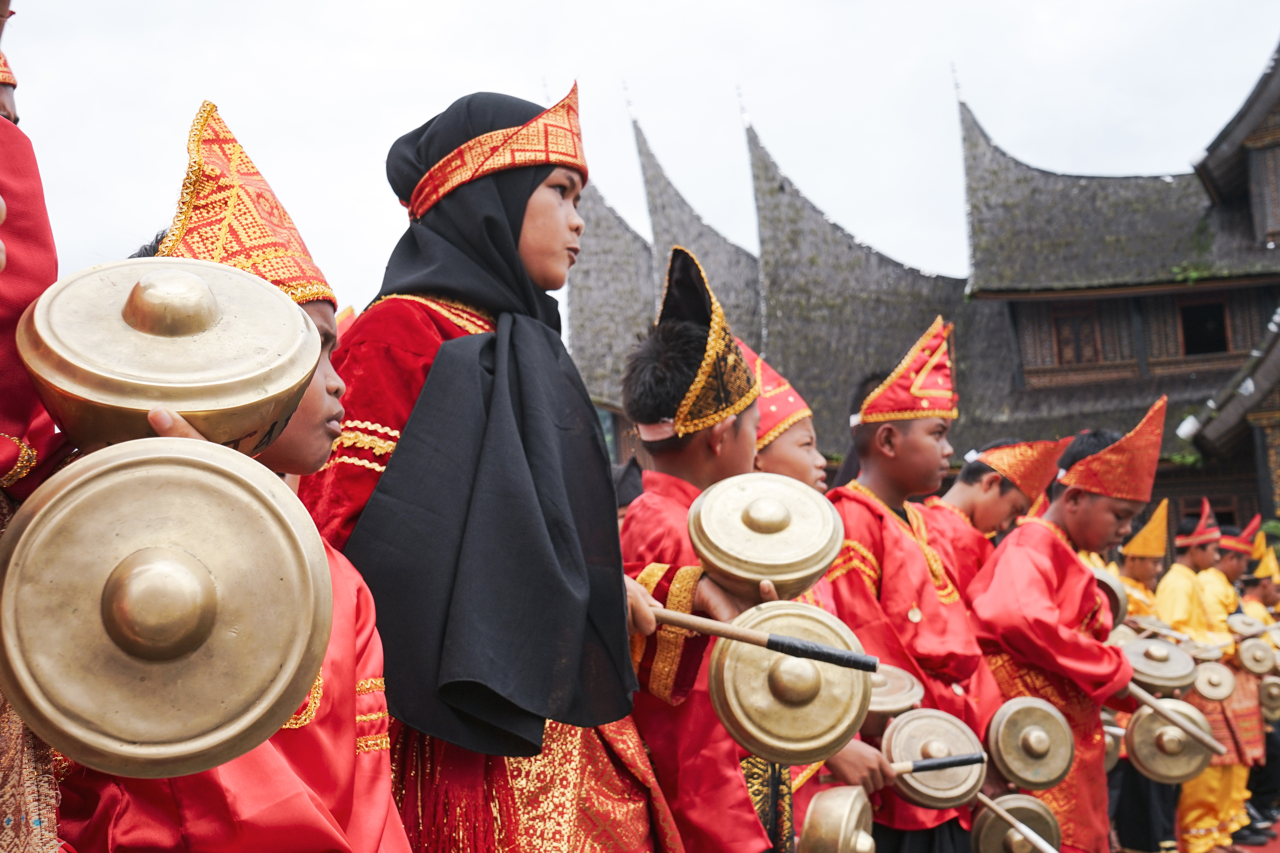 Talaempong pacik adalah salah satu alat musik tradisional asli minangkabau, alat musik ini mirip dengan gamelan namun alat musil ini terdiri dari 1 - 3 buah yang memainkannya dengan cara di pacik (di pegang) oleh pemainnya, alat musik ini biasa di mainkan sebagai musik pengiring acara-acara adat yang di mainkan secara bersama-sama atau lebih dari satu orang pemain.